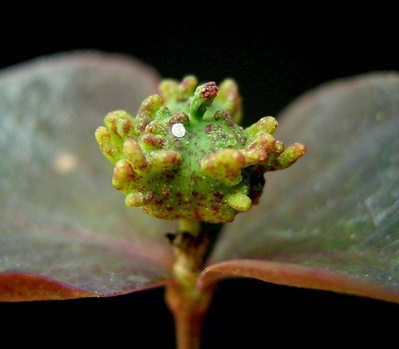 Euphorbia dulcis